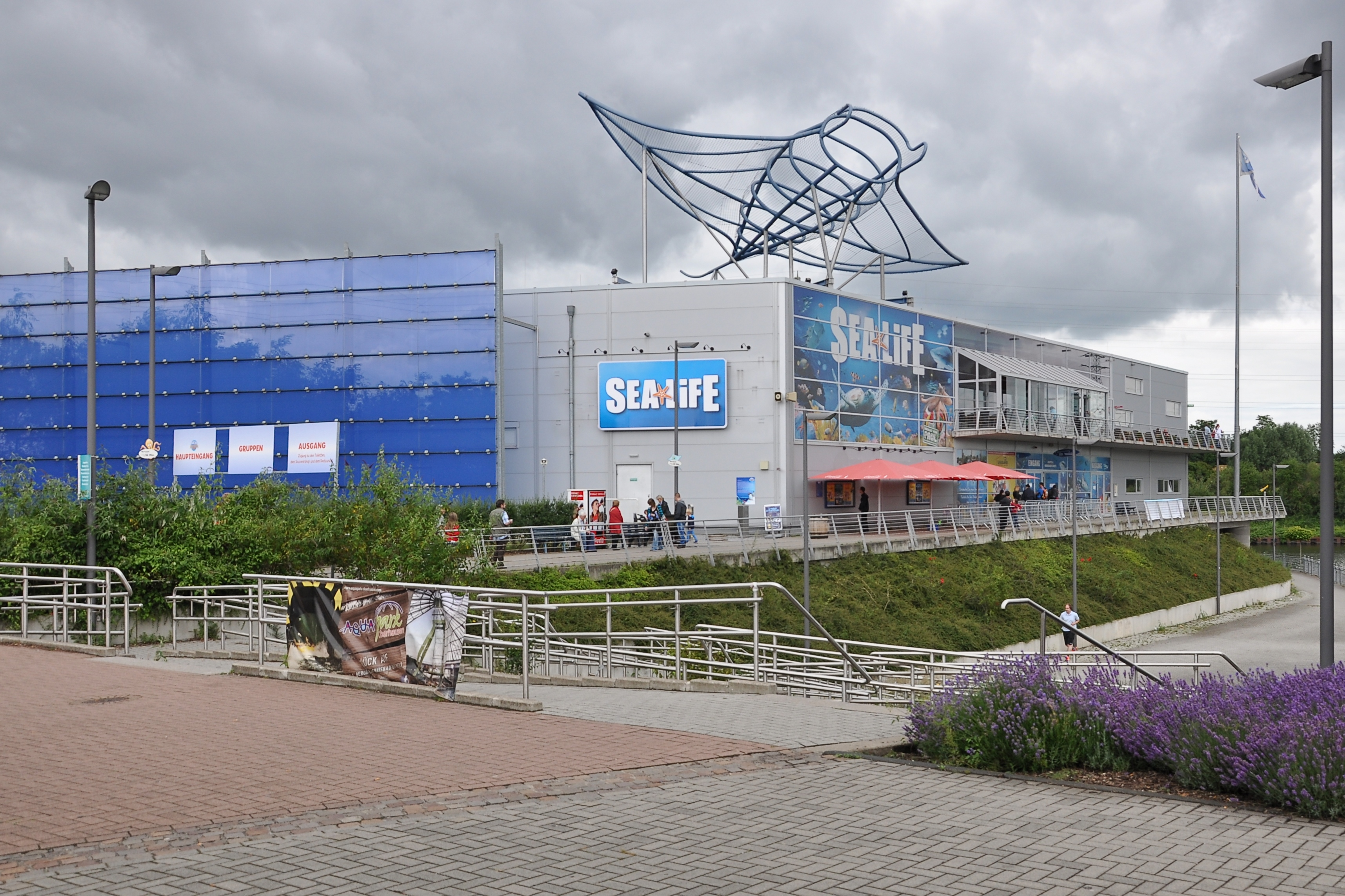 Sea Life Centre Oberhausen